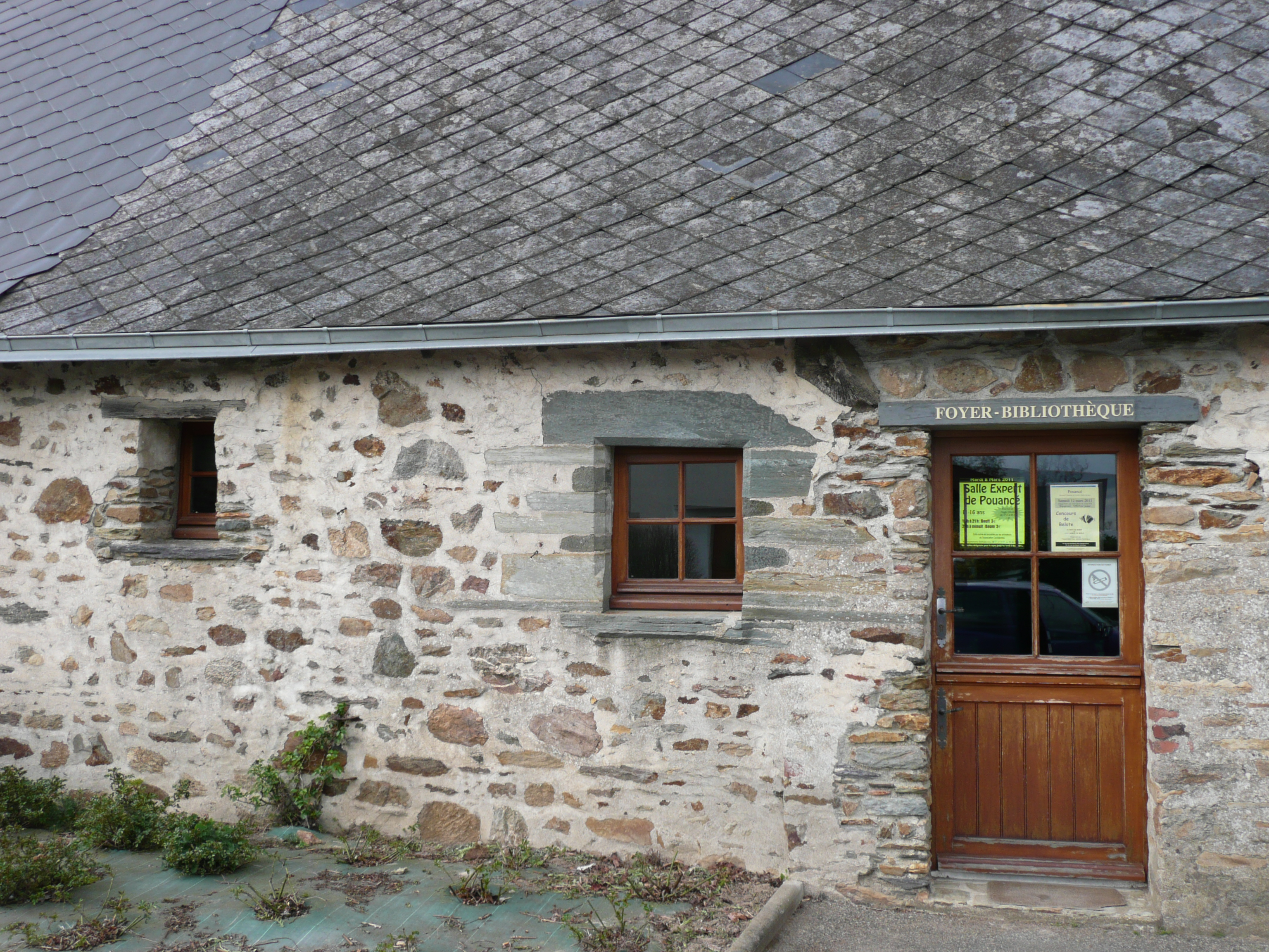 Bibliothèque et foyer de jeunes de Carbay (Maine-et-Loire, France).